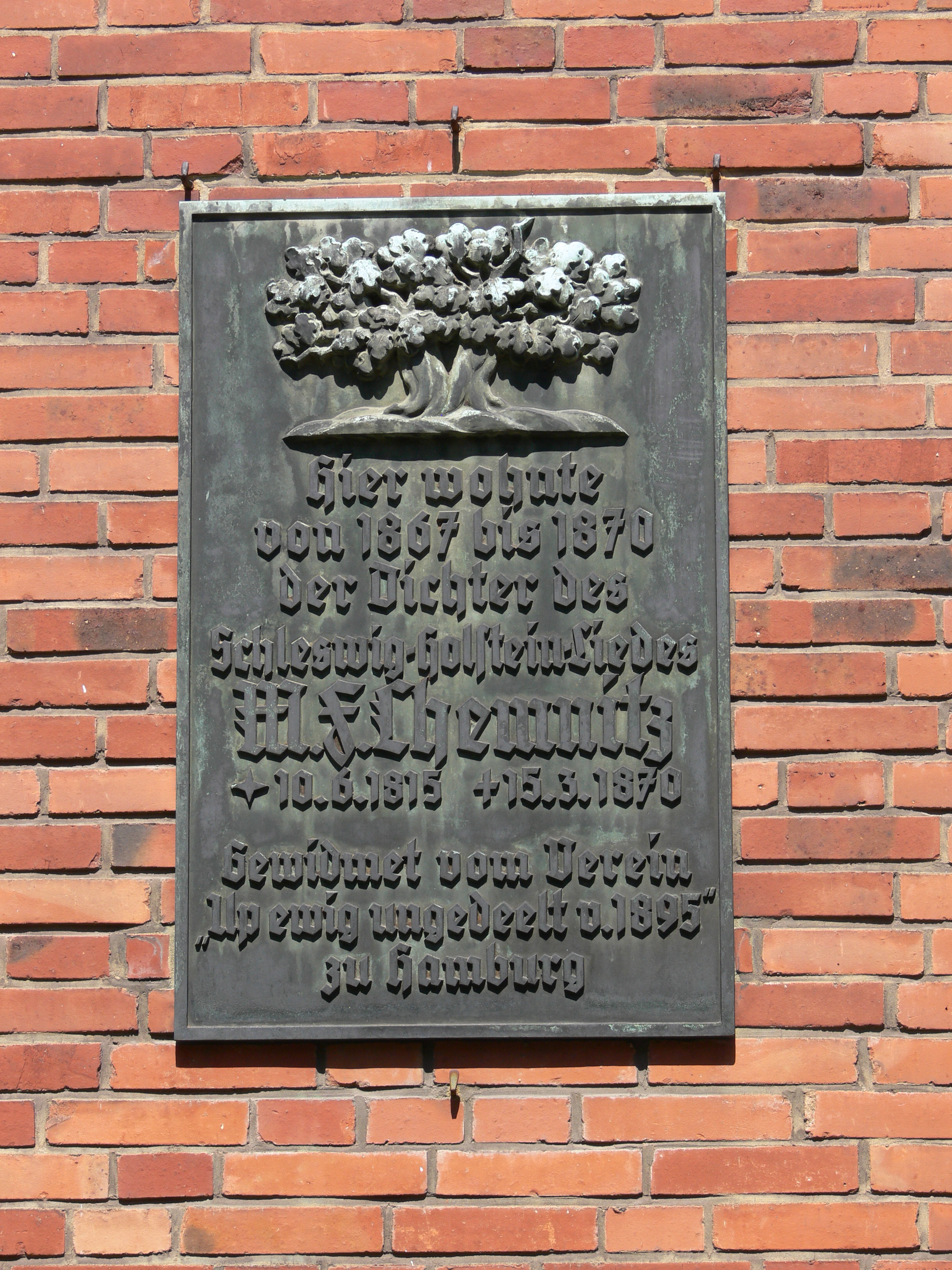 Hamburg-Altona, Chemnitzstraße 75 (ehemals Wilhelmstraße 75), Erinnerungstafel an Matthäus Friedrich Chemnitz von 1936 (am Nachfolgerbau des 1943 zerstörten Wohnhauses von Chemnitz)